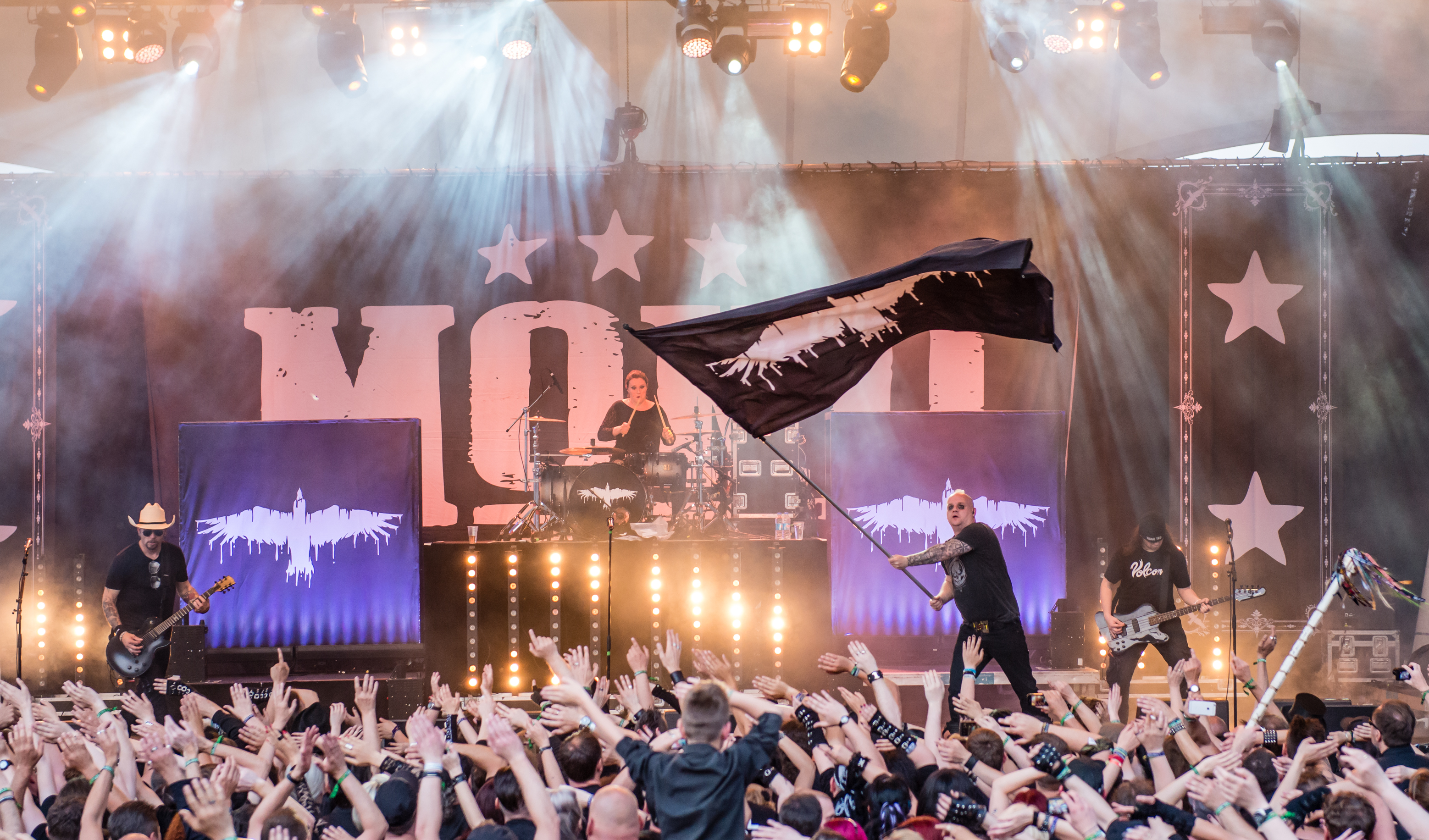 'Blackfield Festival 2015; Gelsenkirchen Amphitheater': 'Mono Inc'